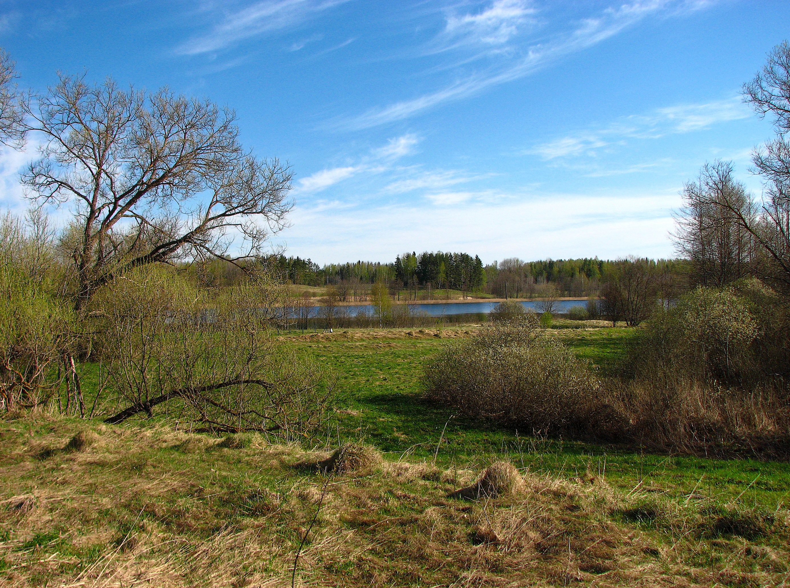 Aglona Parish, Latvia